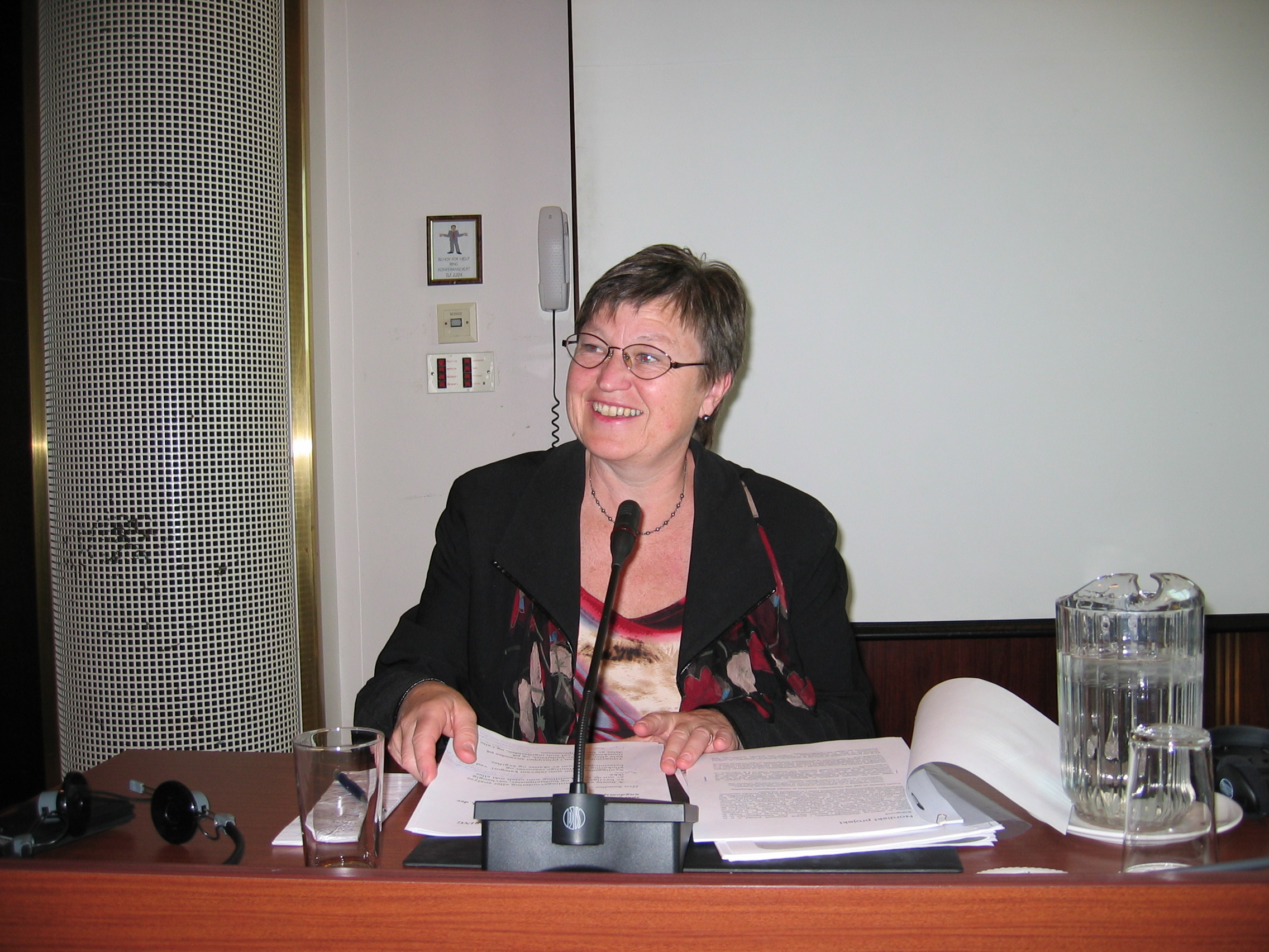 Laila Dåvøy